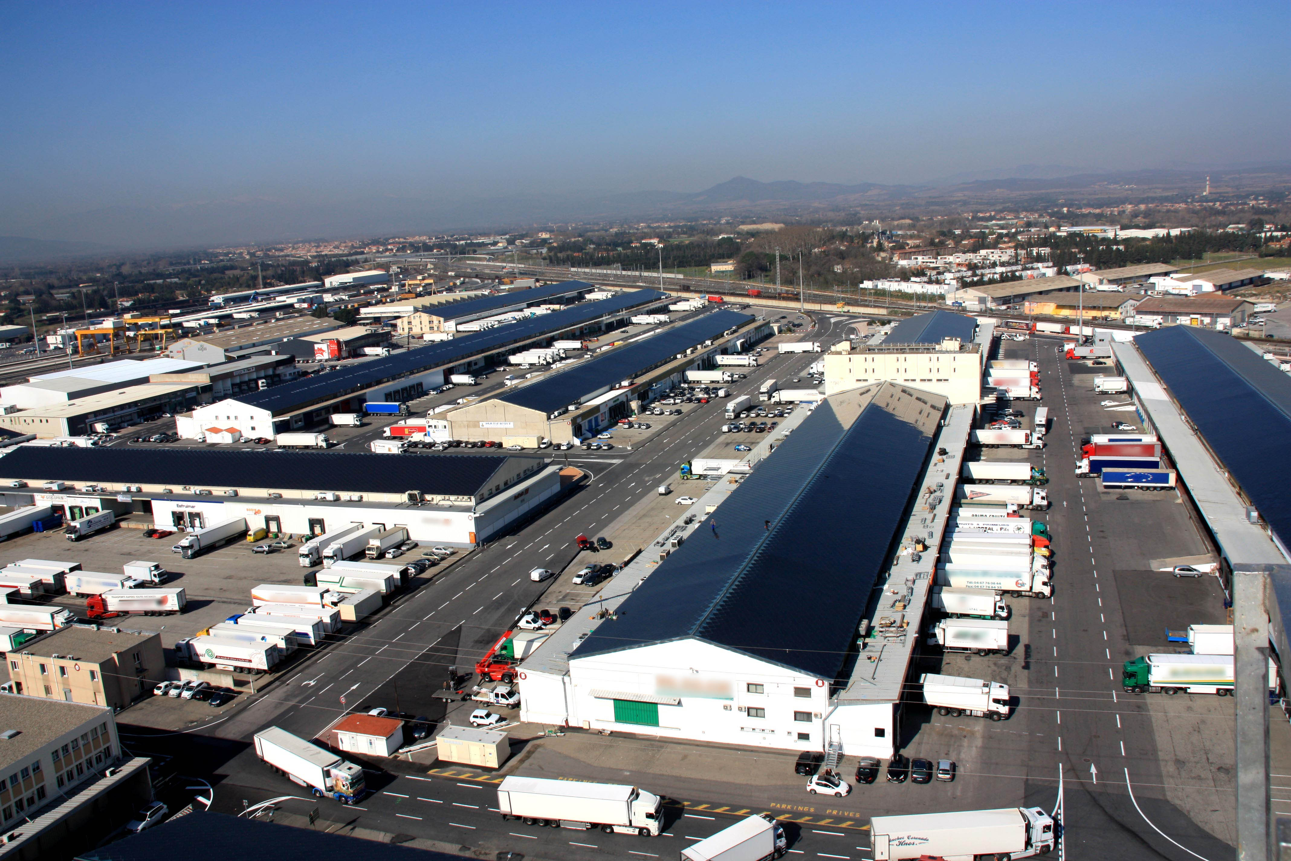 Perpignan (Pyrénées-Orientales, France) - Vue aérienne de Saint-Charles International.